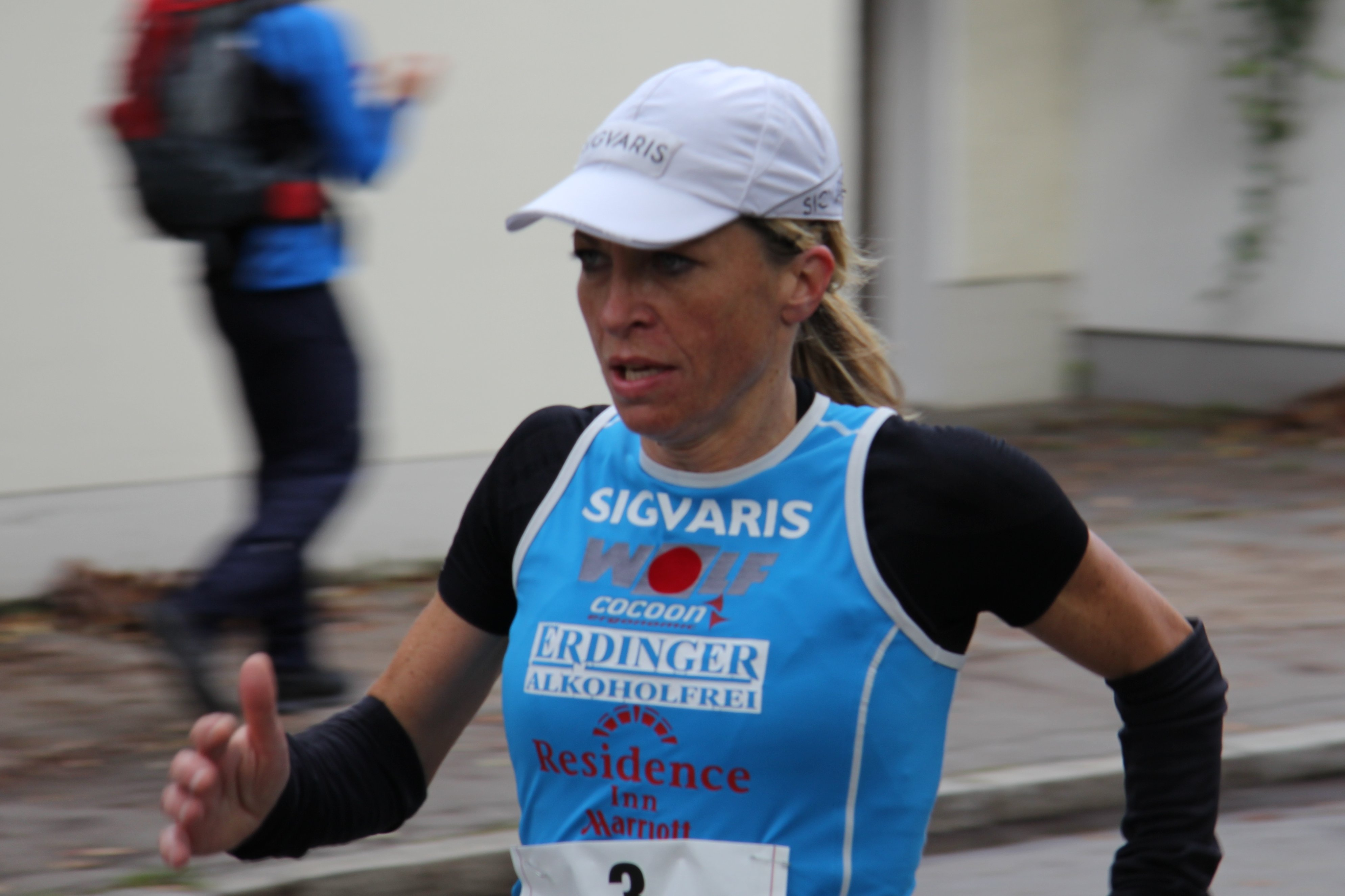 Bernadette Pichlmaier, München-Marathon 2011